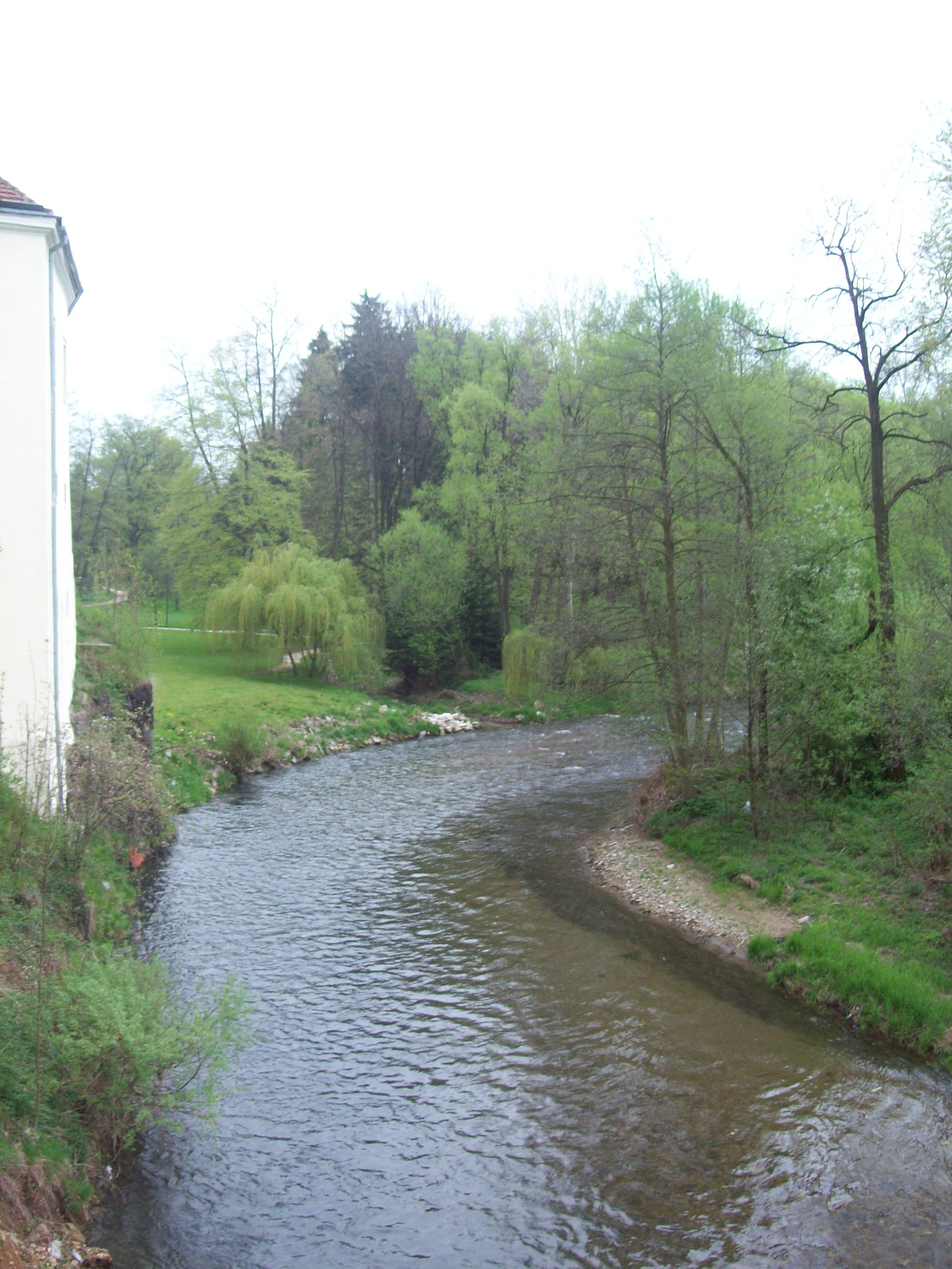 Biała Lądecka w centrum Trzebieszowic, widok z pałacu